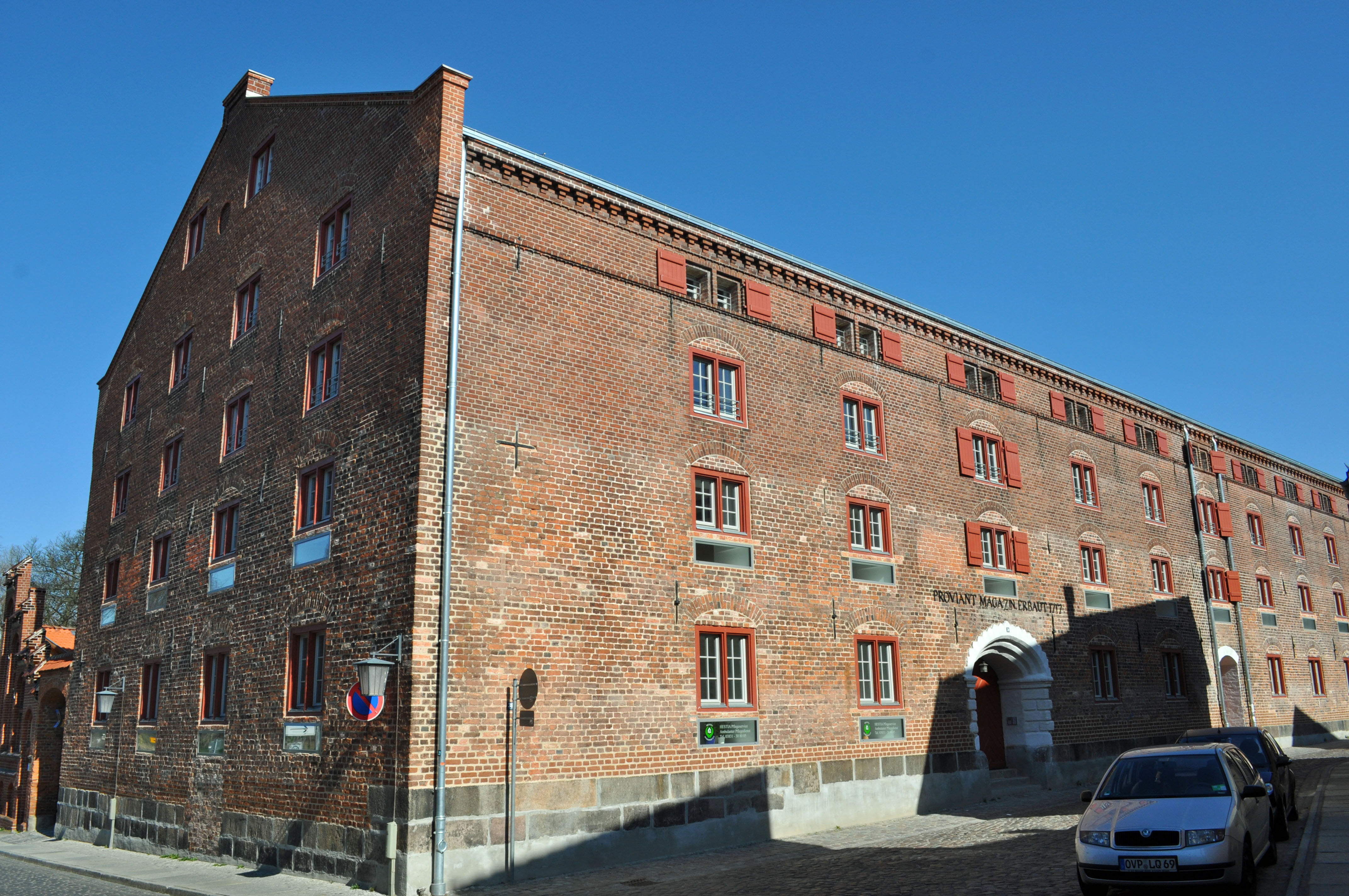 Gebäude bzw. Gebäudedetail in Stralsund. Straße und Hausnummer siehe Dateiname.